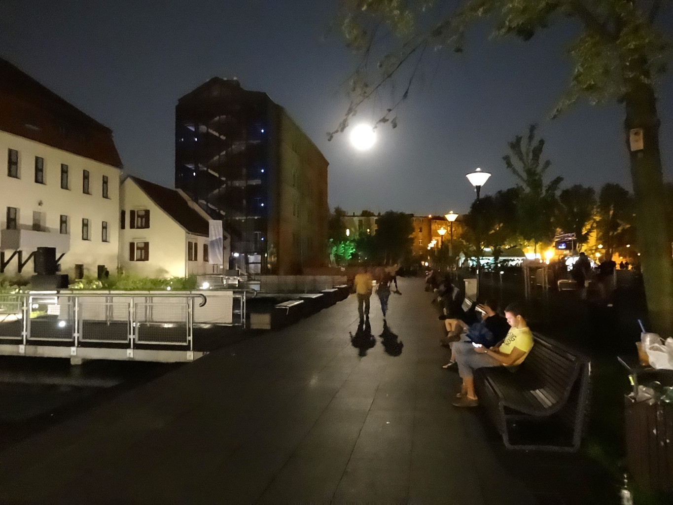 Kaskada Międzywodzie na Wyspie Młyńskiej w Bydgoszczy, odtworzona w 2007 roku